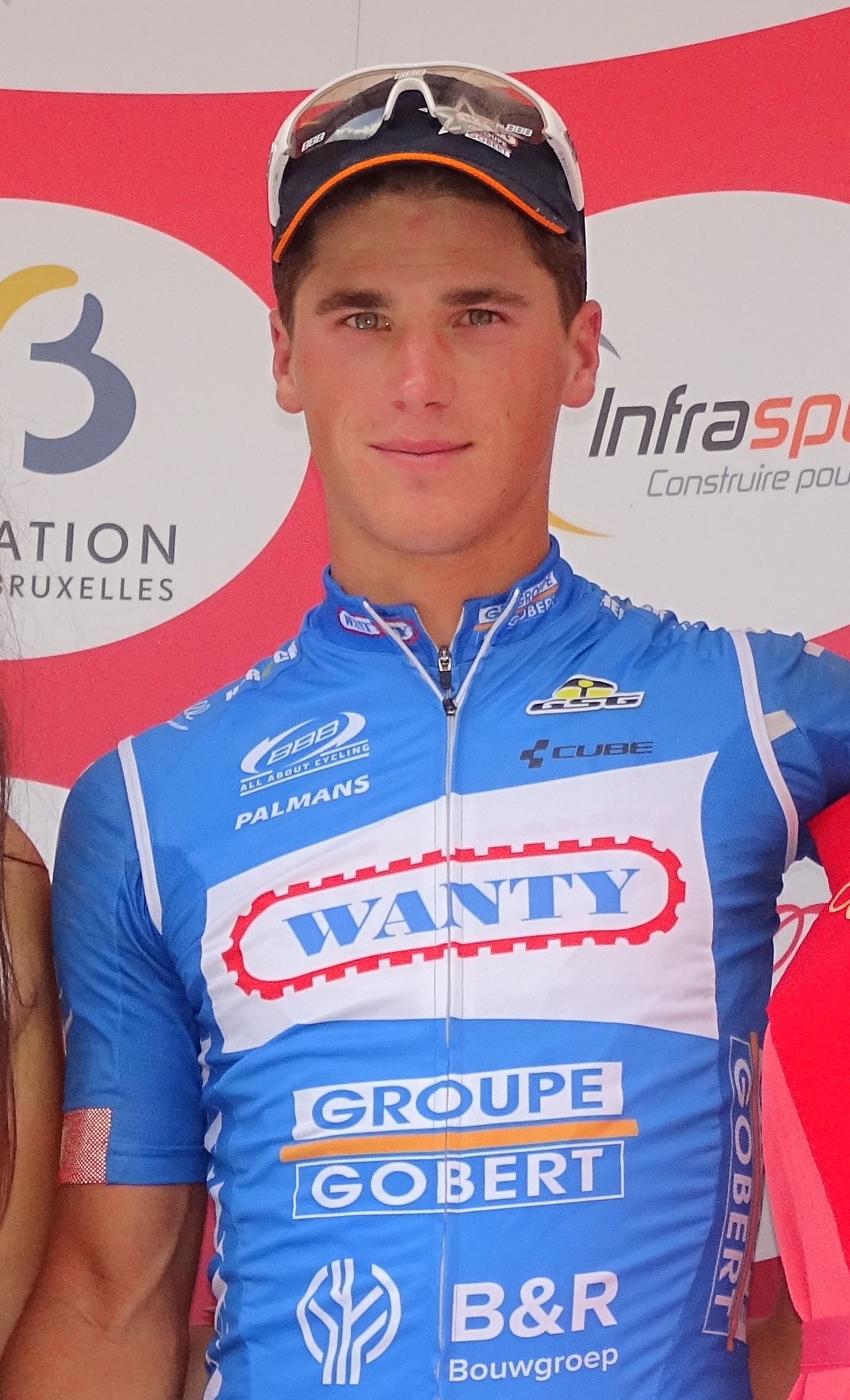 Reportage réalisé le mercredi 22 juillet à l'occasion de l'arrivée du Grand Prix Pino Cerami 2015 à Frameries, Belgique.